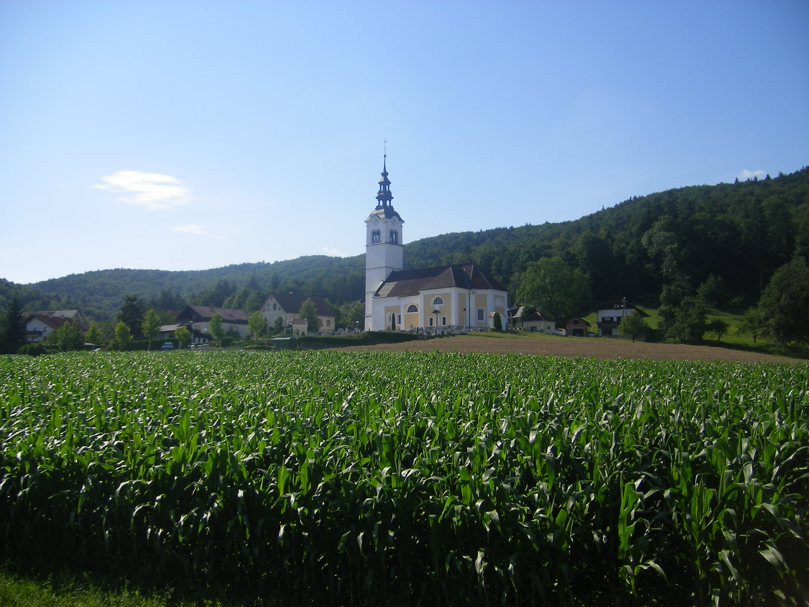 Brezovica pri Ljubljani